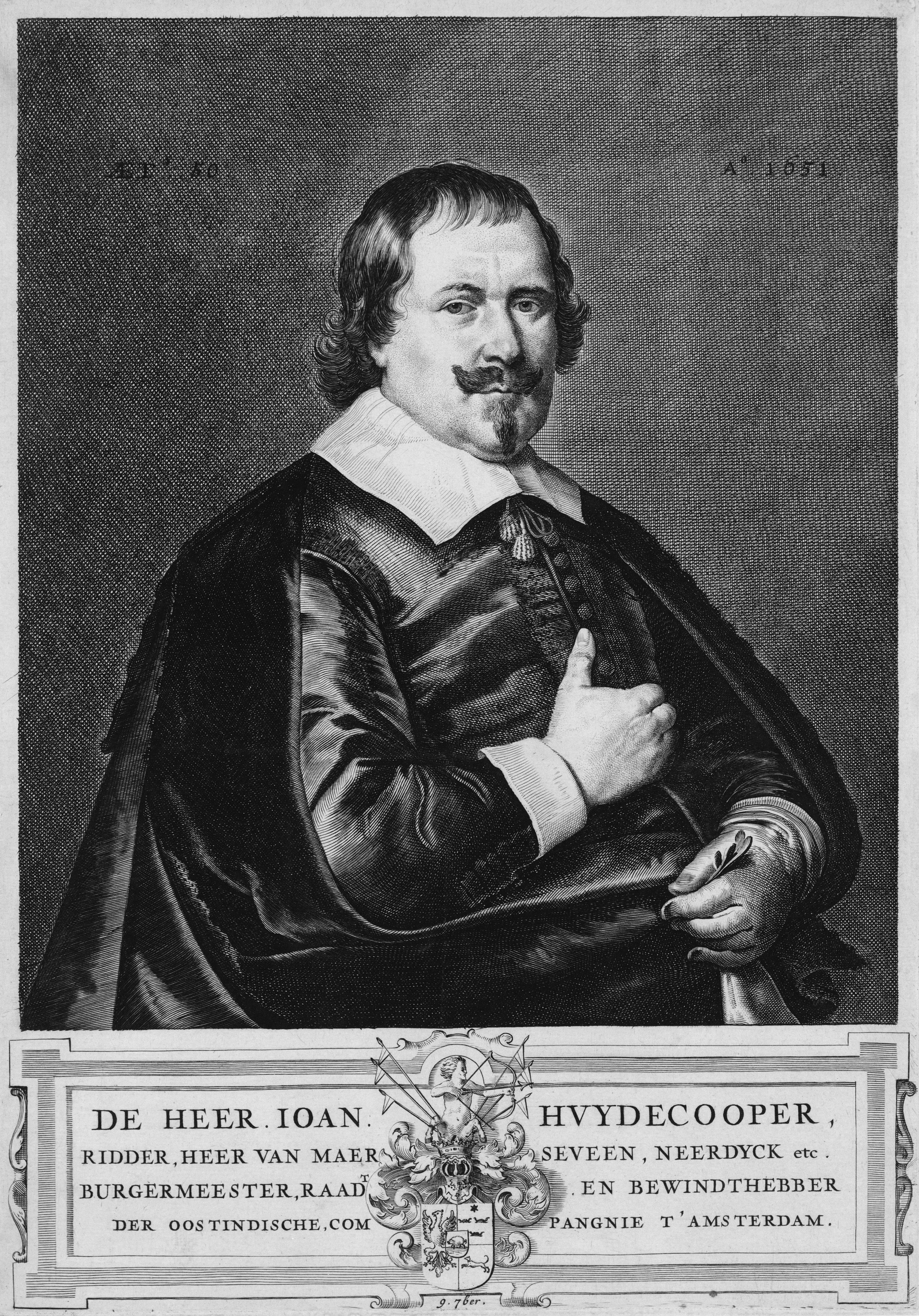 Johan Huydecoper (1599 / 26-10-1661) Burgemeester van Amsterdam 1651-1660. Afmetingen: 315 x 219 mm.